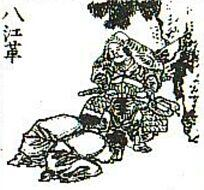 江革